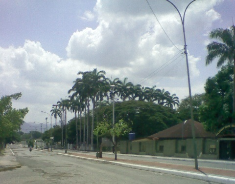 Vista de la Avenida Luis Aparicio, el Colegio de Medicos y la Region de salud del estado Guarico.